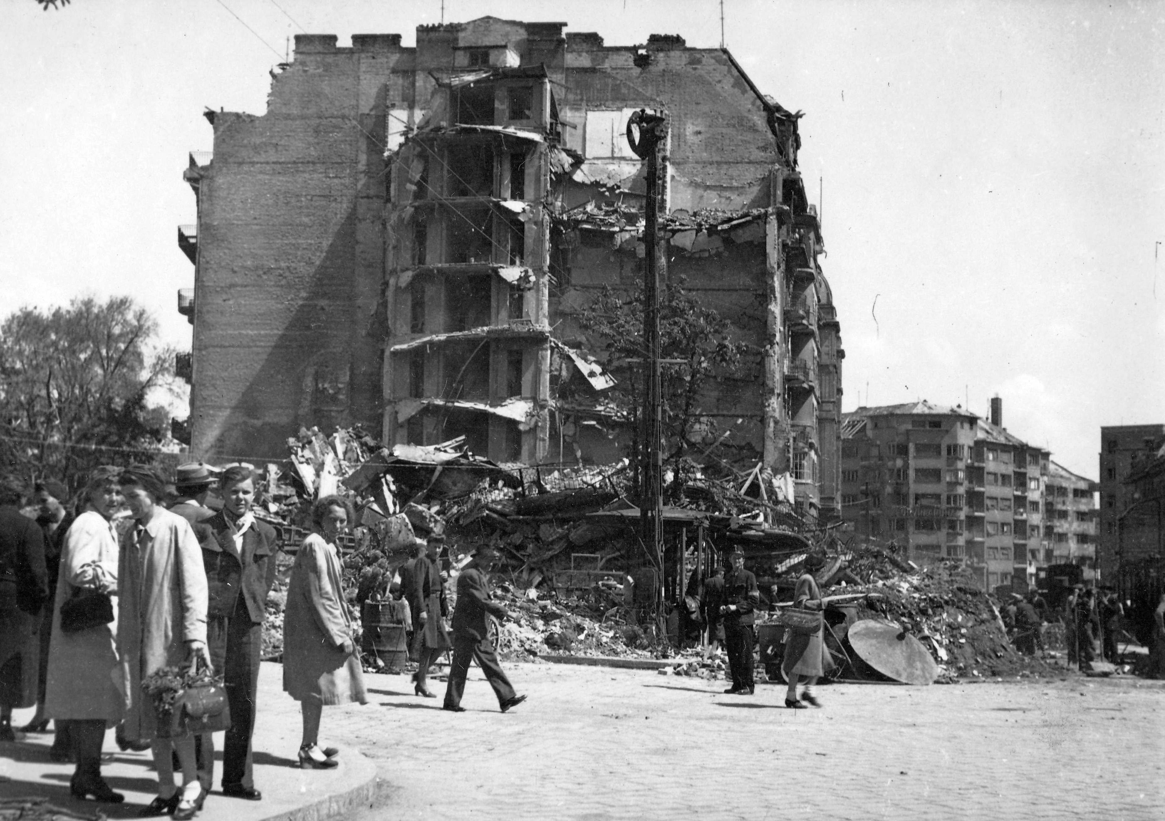 Margit körút - Keleti Károly utca sarok, az 1945. január 21-éről 22-re virradó éjszakán felrobbant Regent-ház (wikipédia). Location: Hungary, Budapest II. Tags: damaged building, Budapest Title: Margit körút - Keleti Károly utca sarok, a felrobbant Regent-ház.